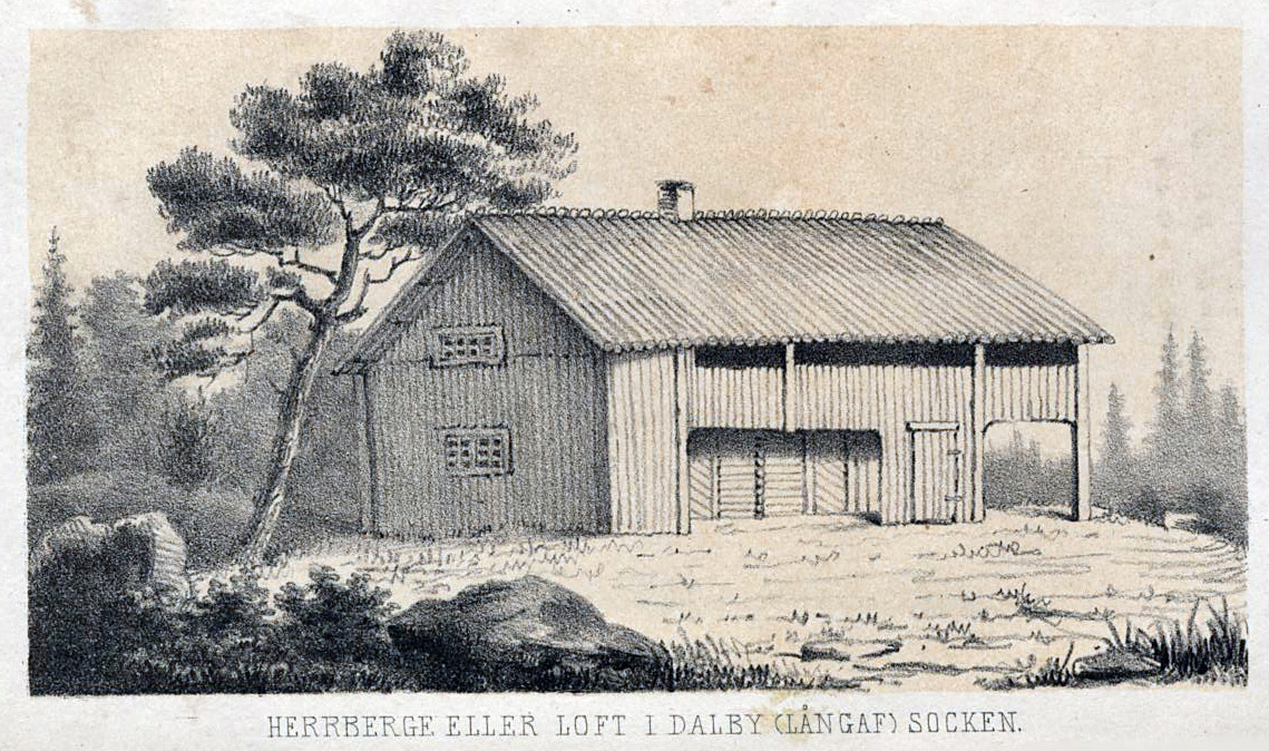 Loft i Dalby socken, Värmland. Finnmarken.